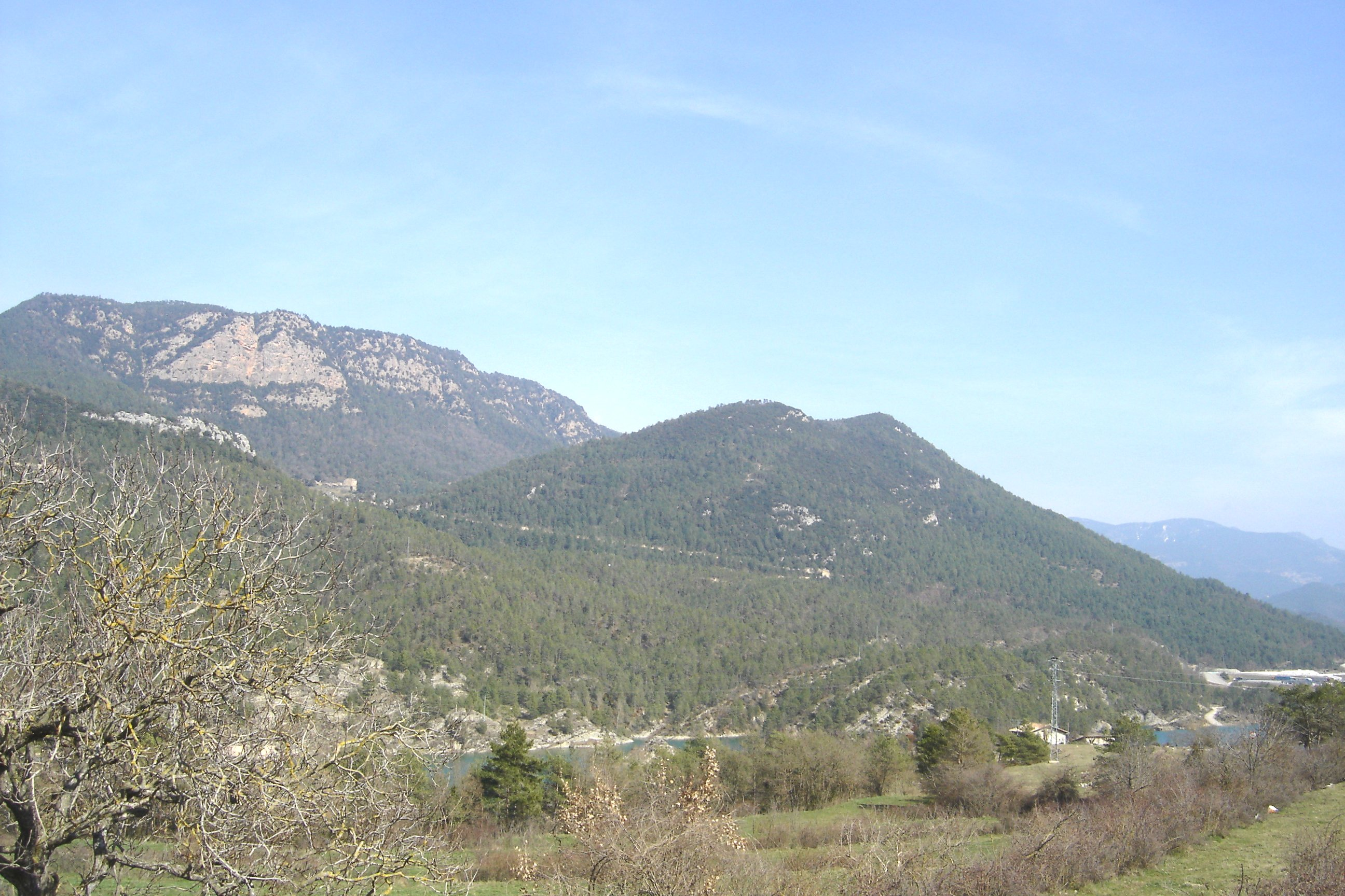 El Montlleó (Guixers, La Coma i la Pedra) a la Vall de Lord (Solsonès) vist des de prop de Sant Llorenç de Morunys. A la dreta i a la seva falda, la Knauf. A l'esquerra i darrera, la Roca de Guixers